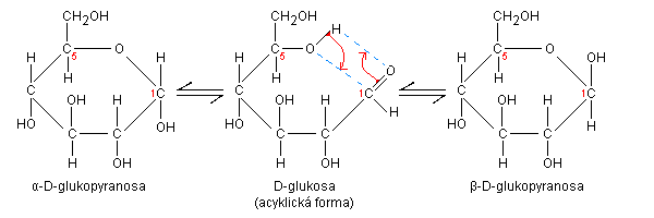 Schema tvorby anomerů D-glukopyranosy z acyklické (lineární) formy a současně procesu mutarotace. Autor: Antonín Vítek, e-mail avitek(at)lib(dot)cas(dot)cz